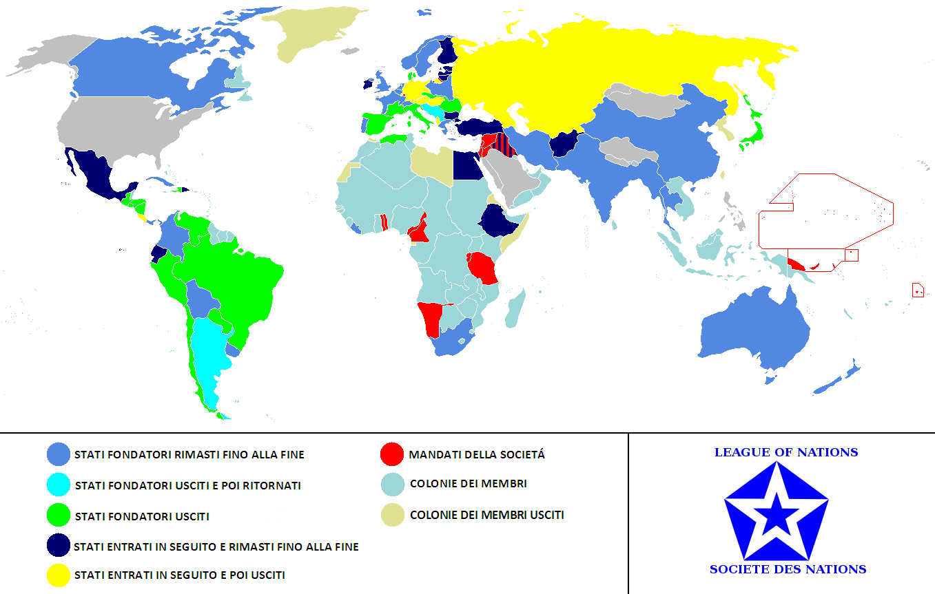 Carta del mondo tra il 1920 e il 1945 che mostra gli Stati della Società delle Nazioni nel mondo